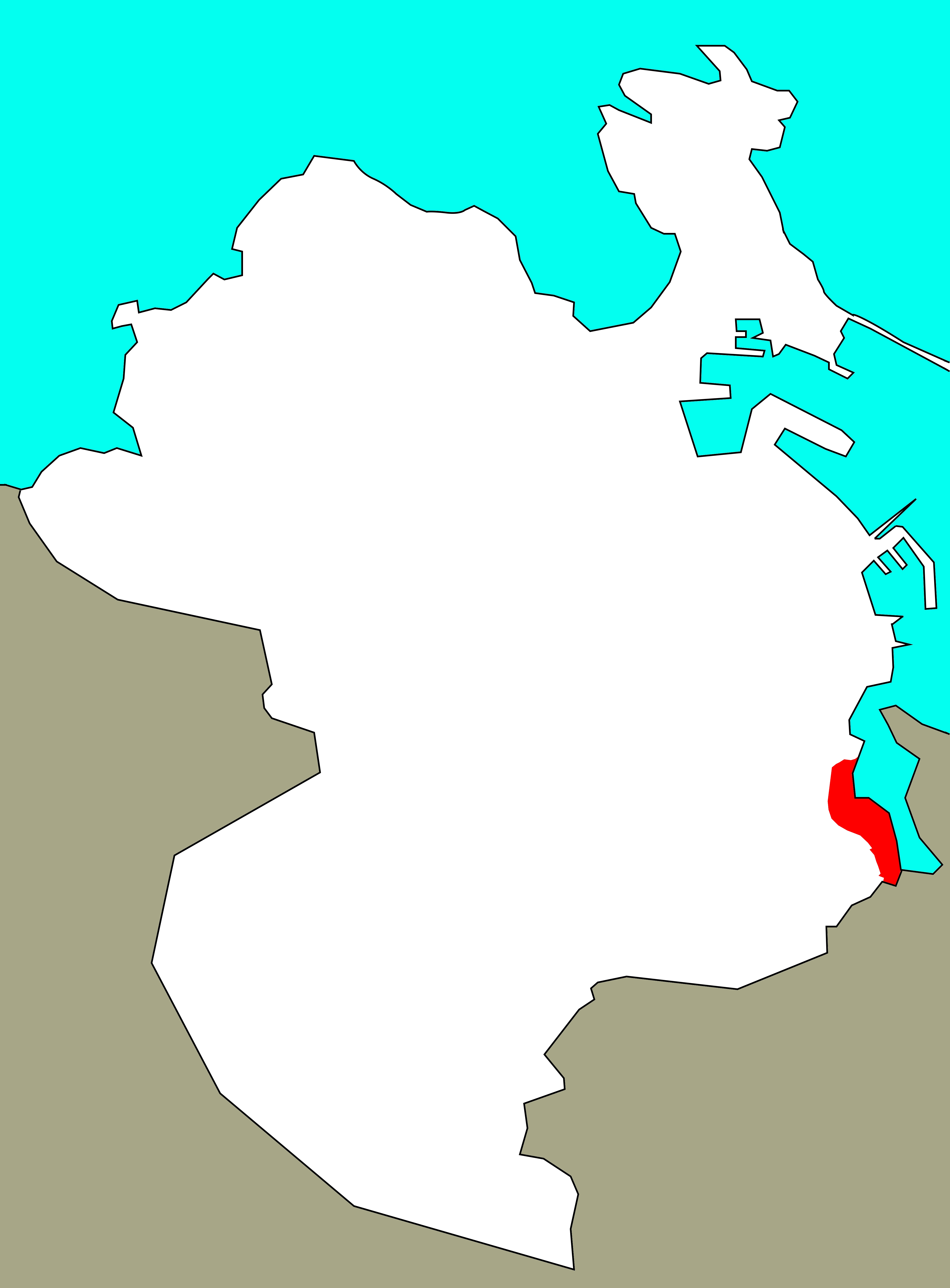 Situación da Pasaxe no concello da Coruña, segundo